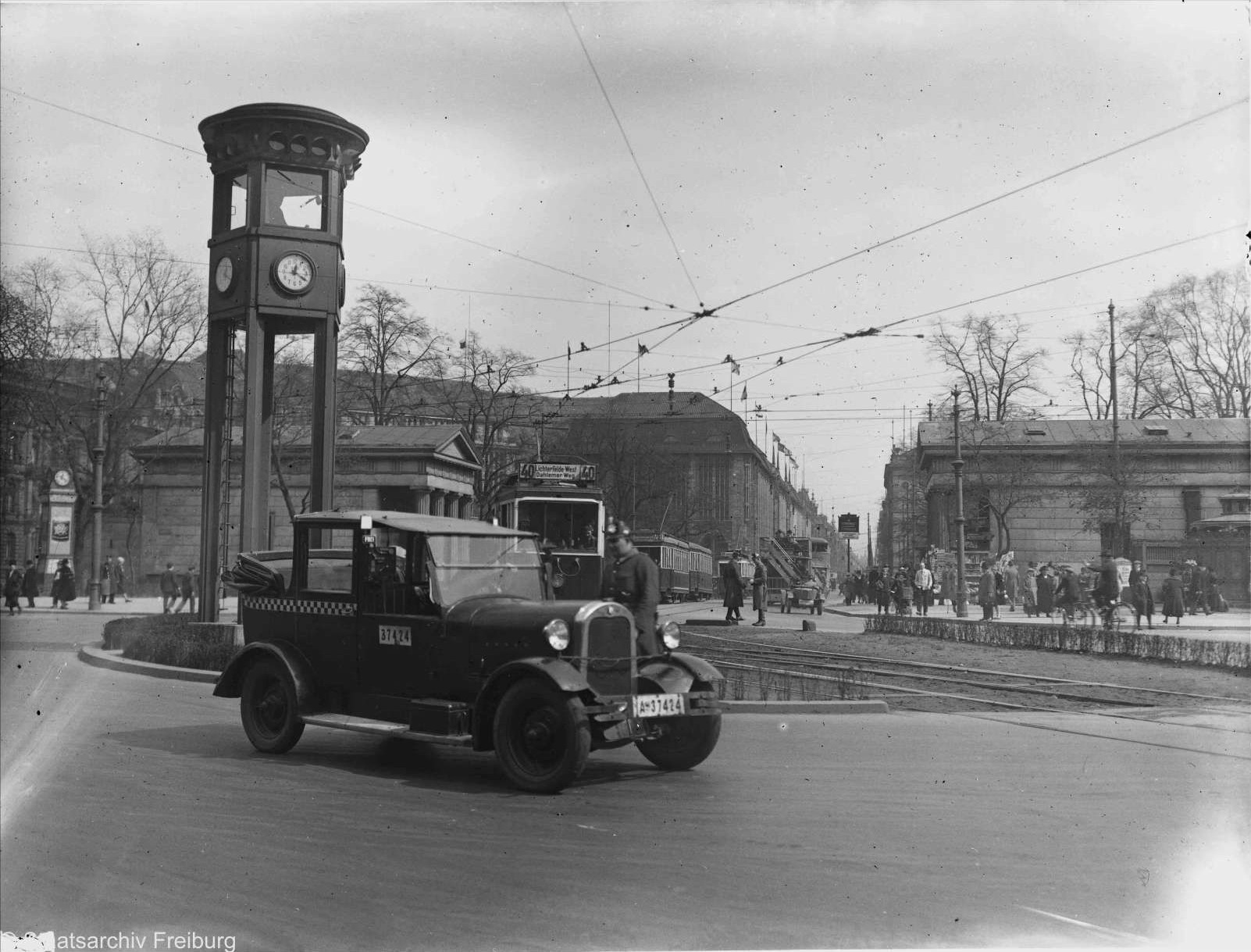 Der Verkehrsturm am Potsdamer Platz in Berlin